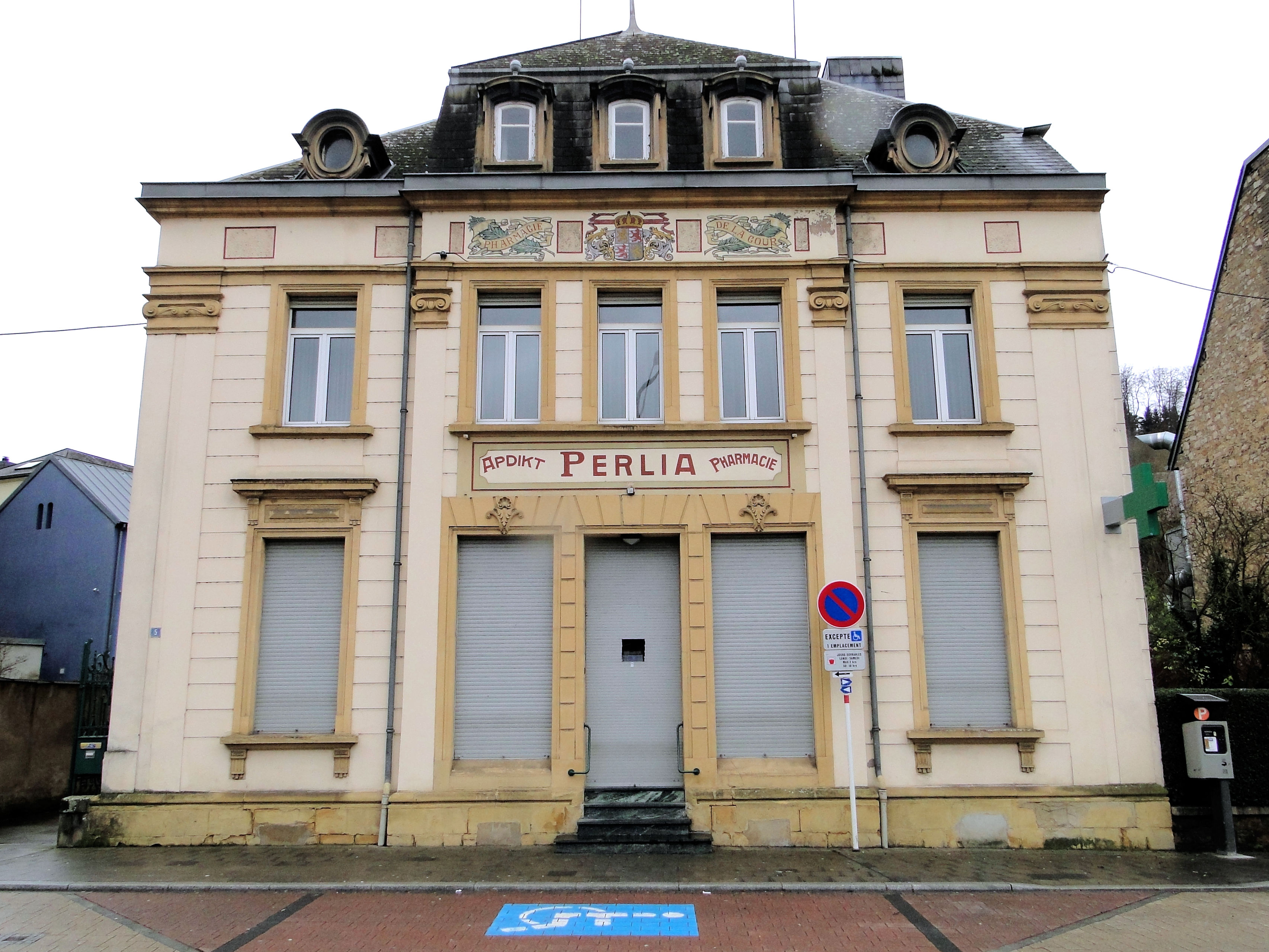 Villa "Pharmacie Perlia" construite par Jean-Pierre Koenig